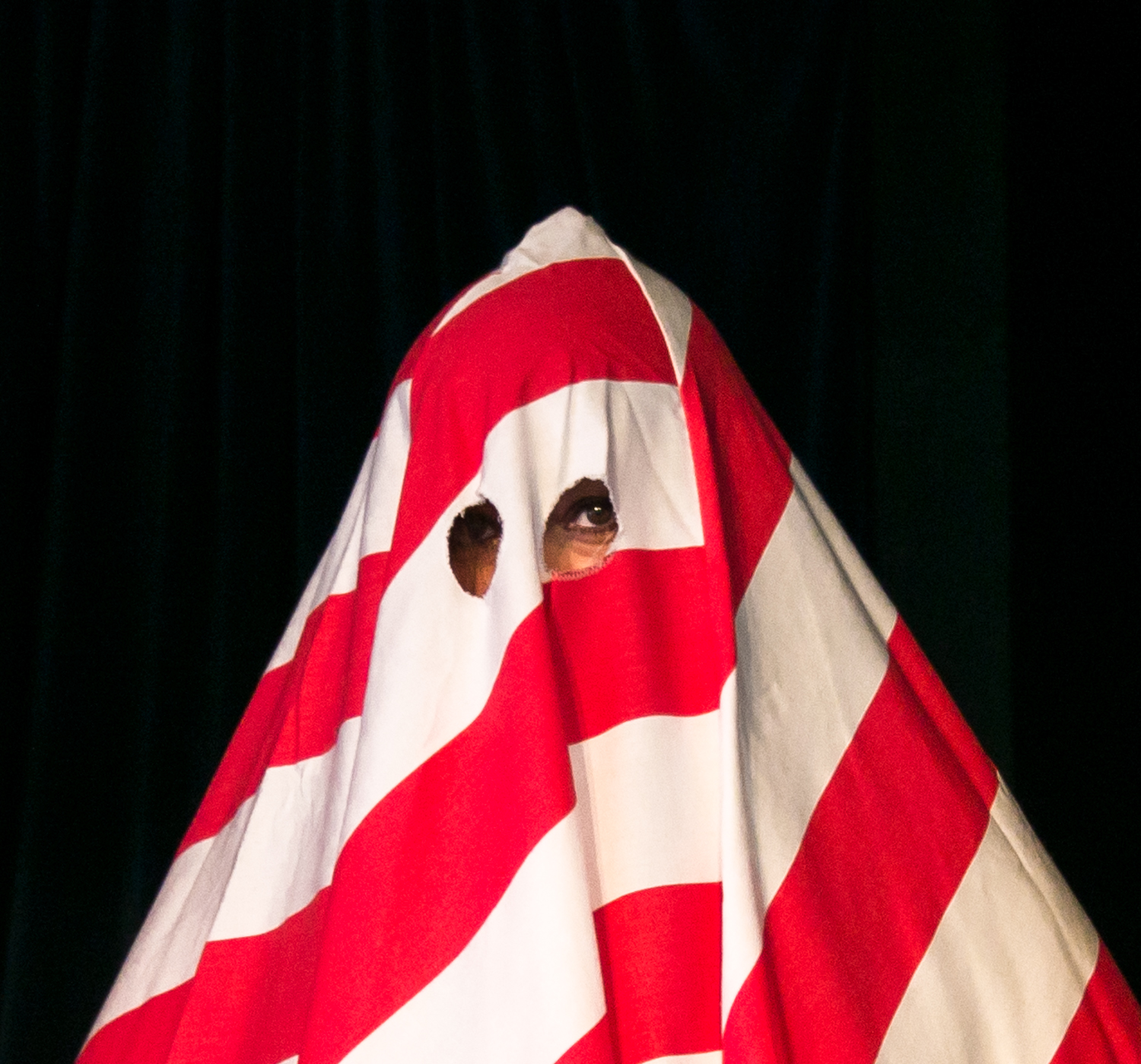 Hemlig Karamelodiktstipendiat.